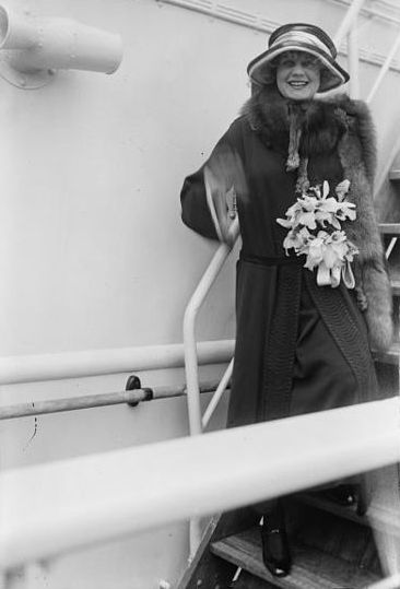 Maria Jeritza (1887 - 1982), Czech opera singer, soprano